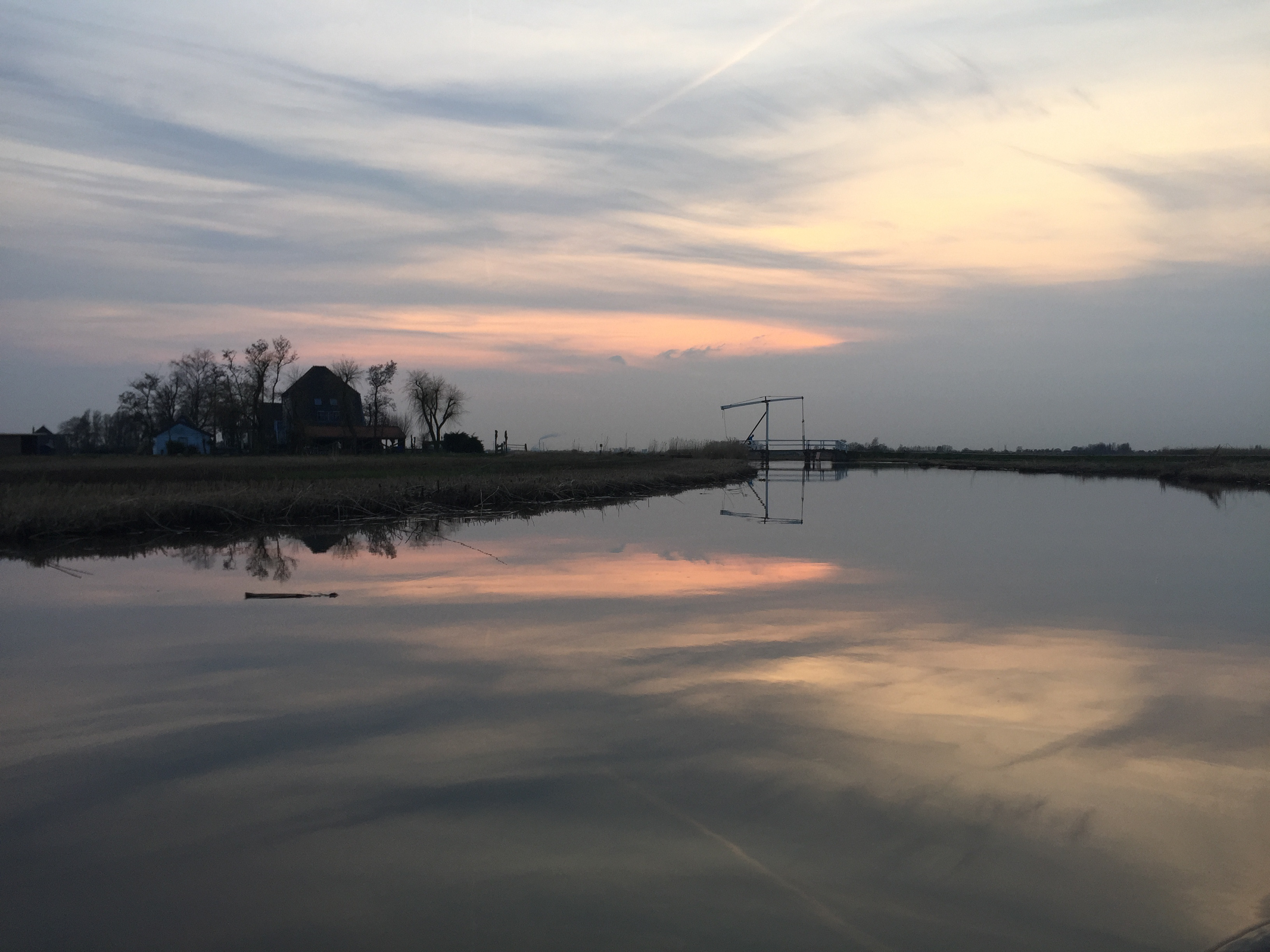 Hett bruggetje in de Poppendammergouw